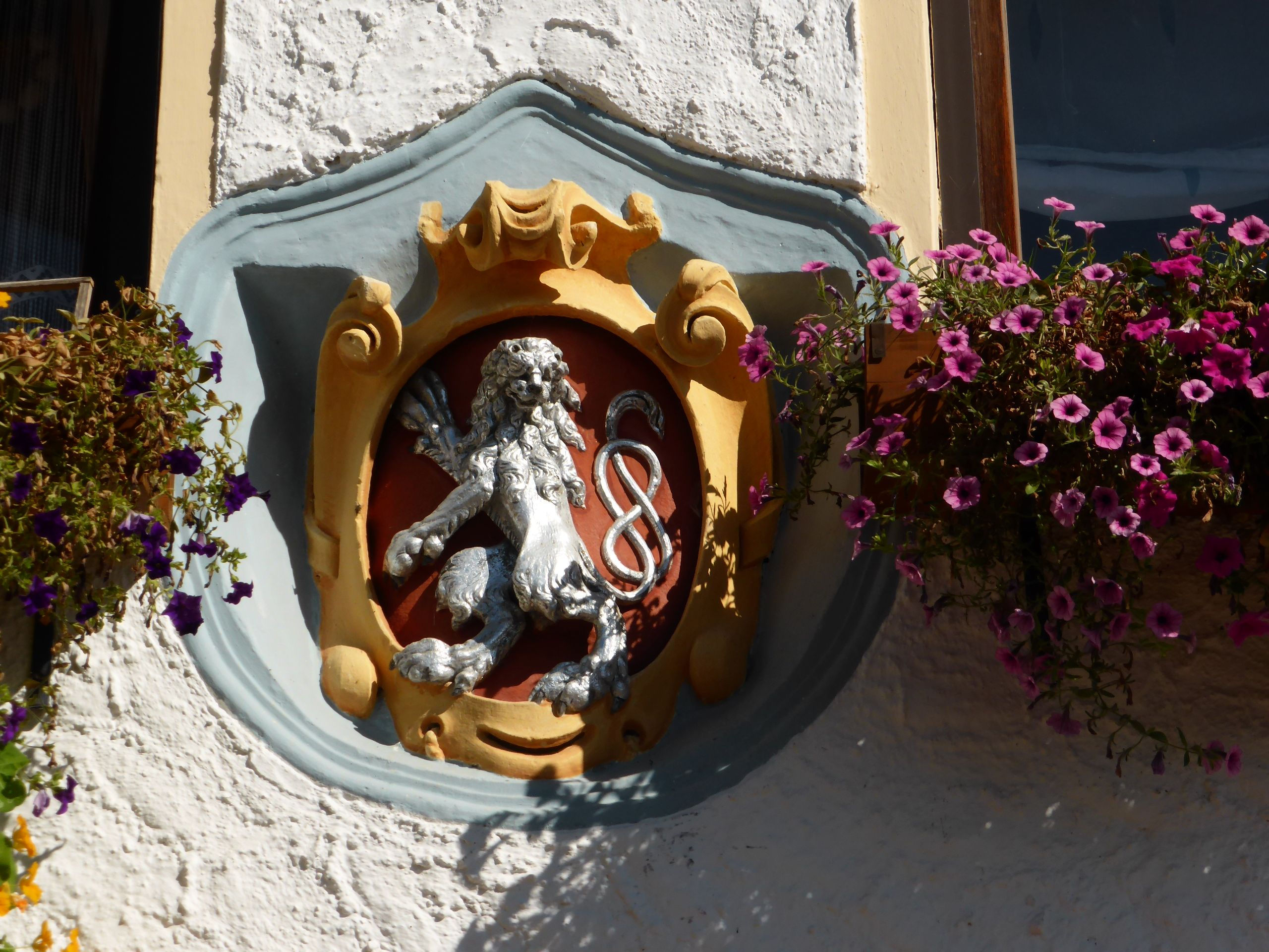 Kirchanschöring (Lampoding - Wappen der Lodron)